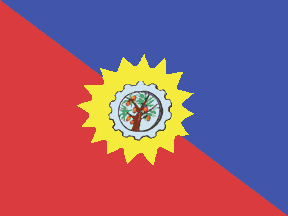 Bandera del municipio Urdaneta, estado Miranda, Venezuela